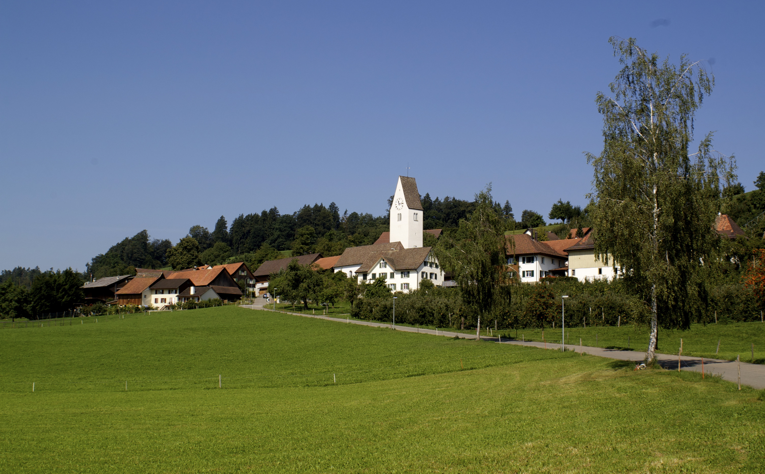 Blick vom Ortsausgange Thundorfs gen Kirchberg hinauf.